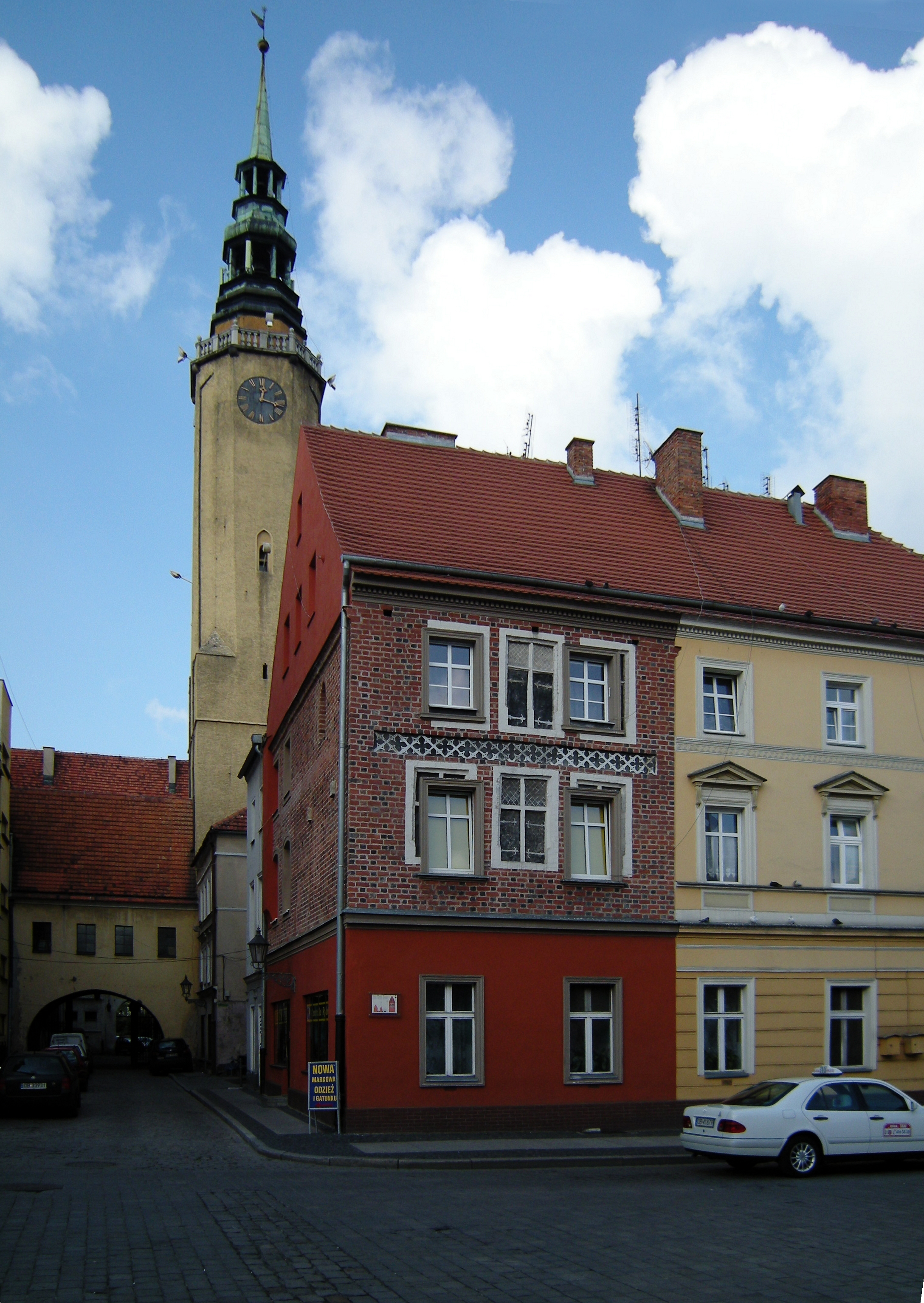 Brzeg, charakterystyczna kamieniczka w rynku